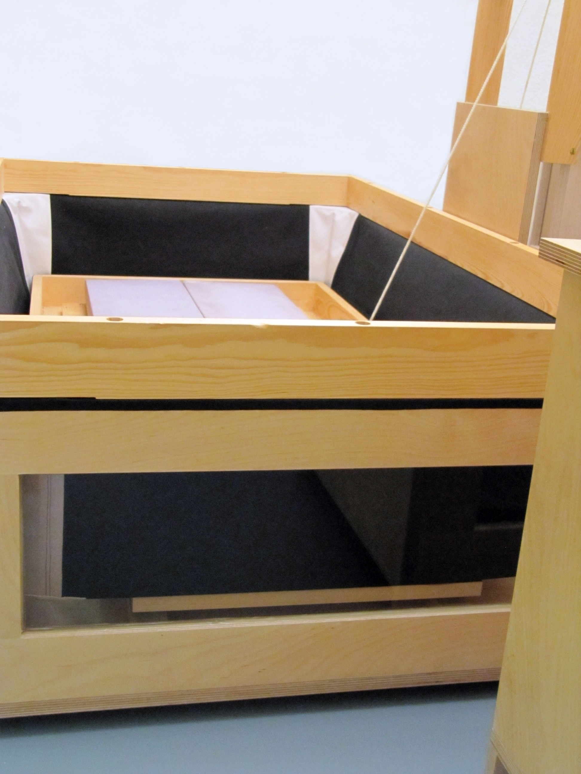 Schwimmerbalg einer Orgel; zu Demonstrationszwecken mit durchsichtigen Wänden